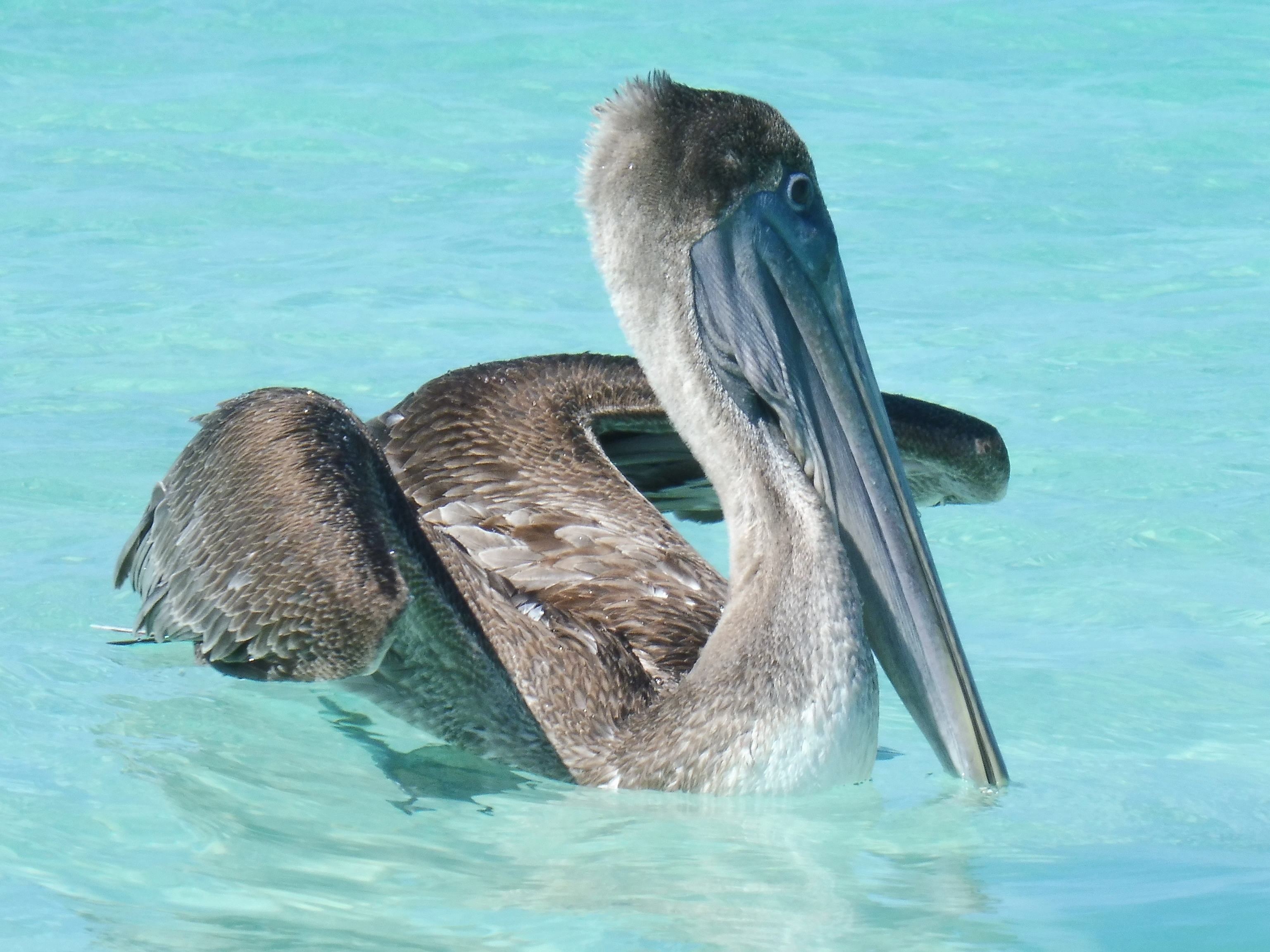 Pélican